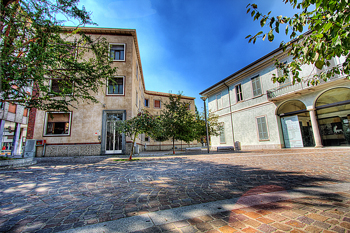 Esterno Fondazione ISEC Piazza Lamarmora, 1 Swsto San Giovanni Italy